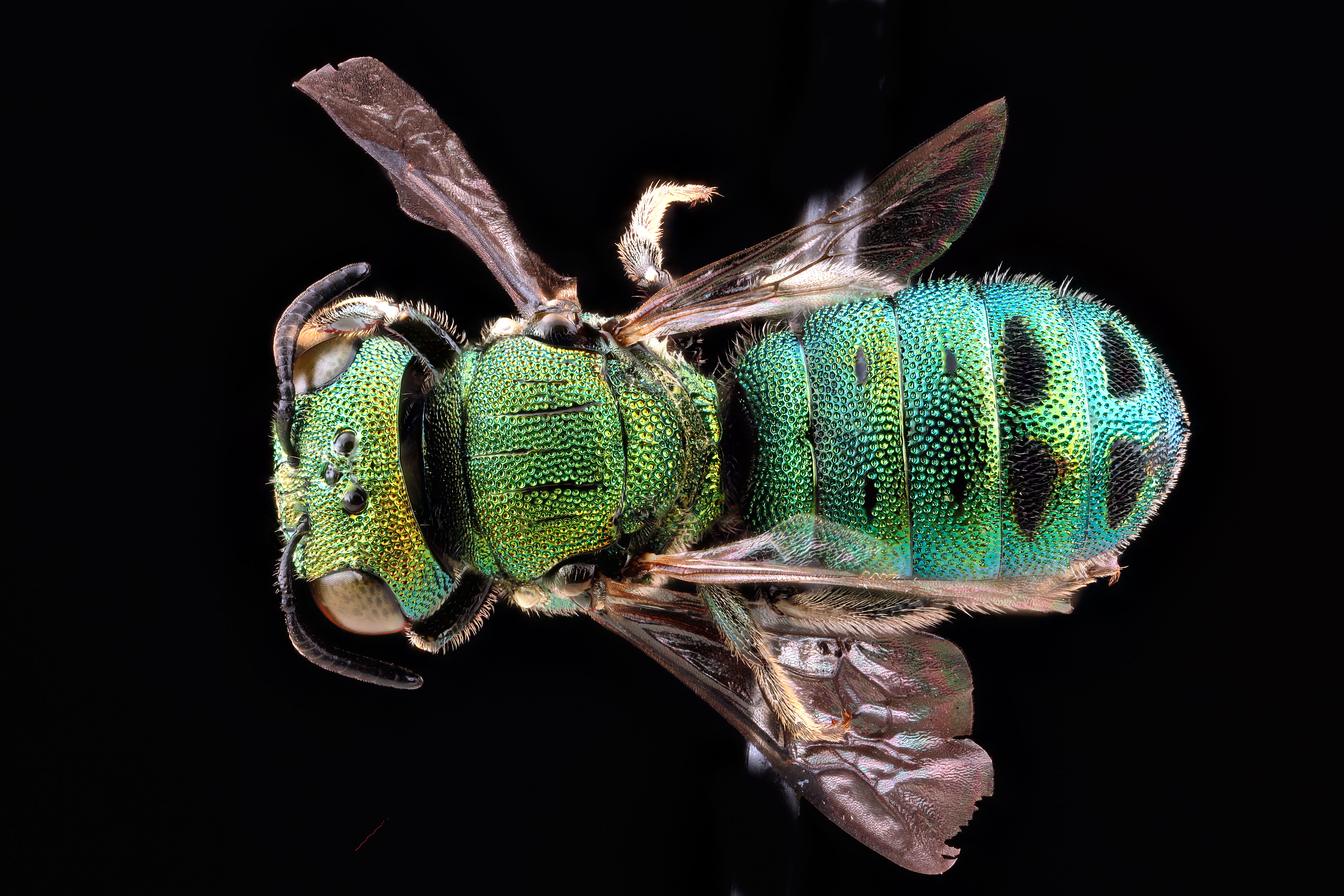 Ceratina smaragdula, male, Hawaii, Oahu, March 2012